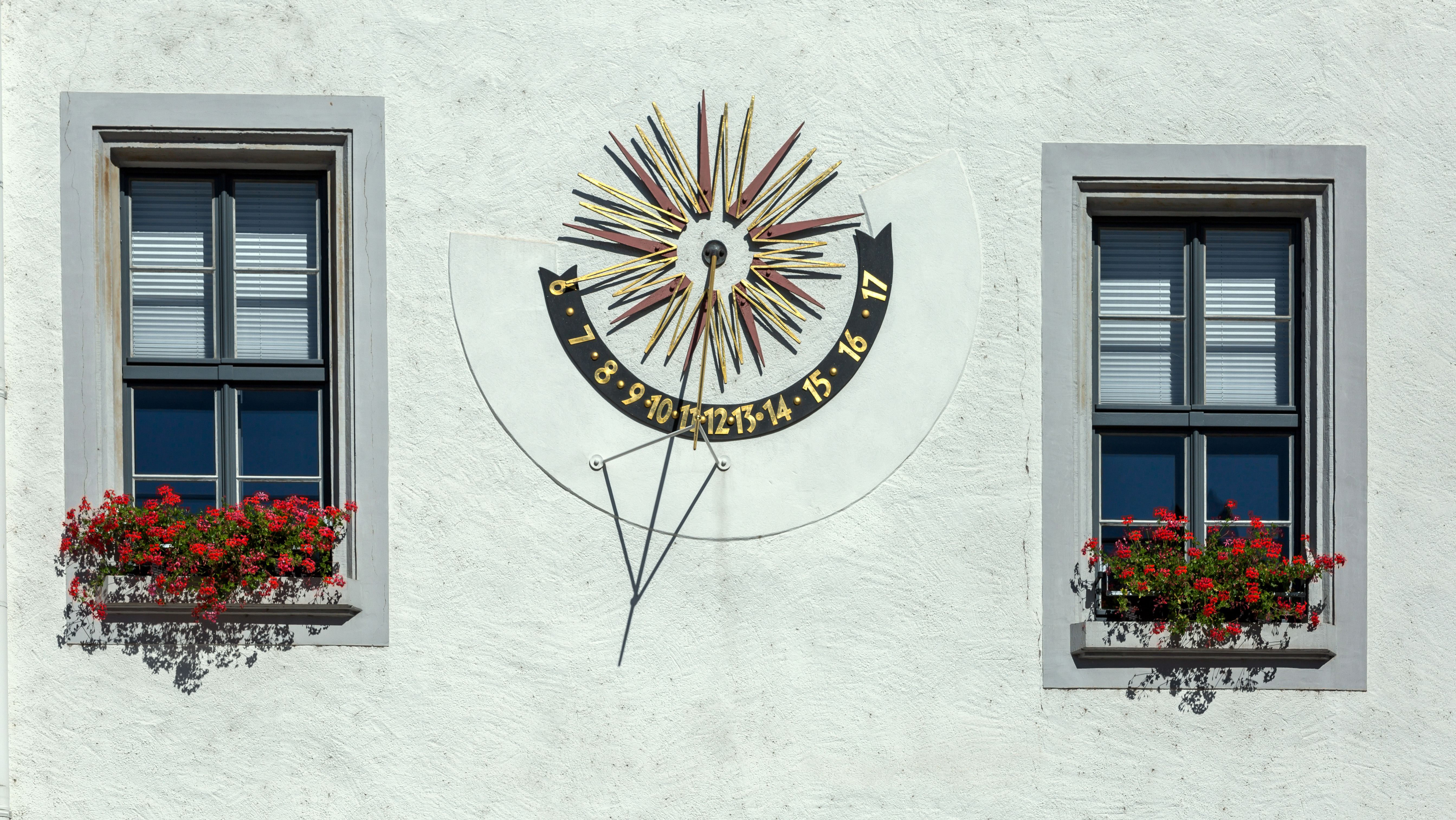 Meißen Markt 1 Rathaus von 1472–1486 in geschlossener Bebauung und Ecklage , Sonnenuhr (1969)